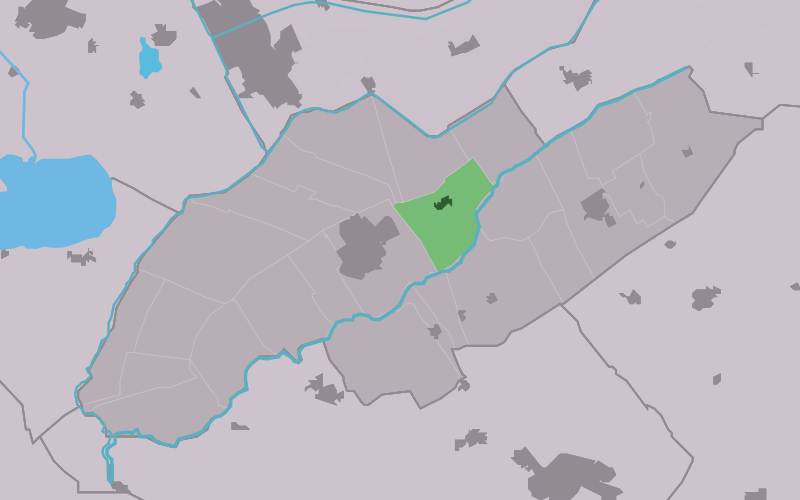 Kaartsje fan himrik fan Aldeholtpea